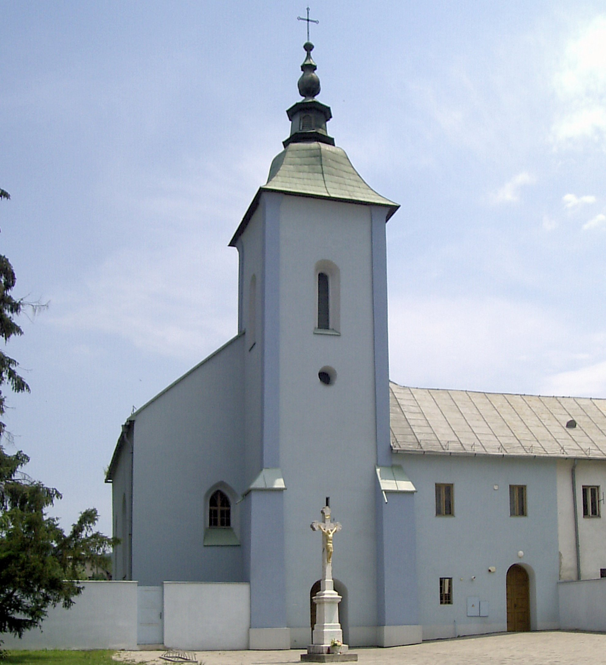 Kostol a kláštor františkánov Stropkov